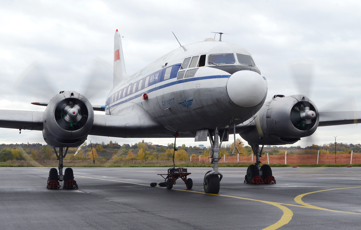 Процесс проверки двигателей АШ-82Т